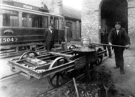 Arbeider ved original gravemaskin, sporvogn til høyre. Sagene i Oslo